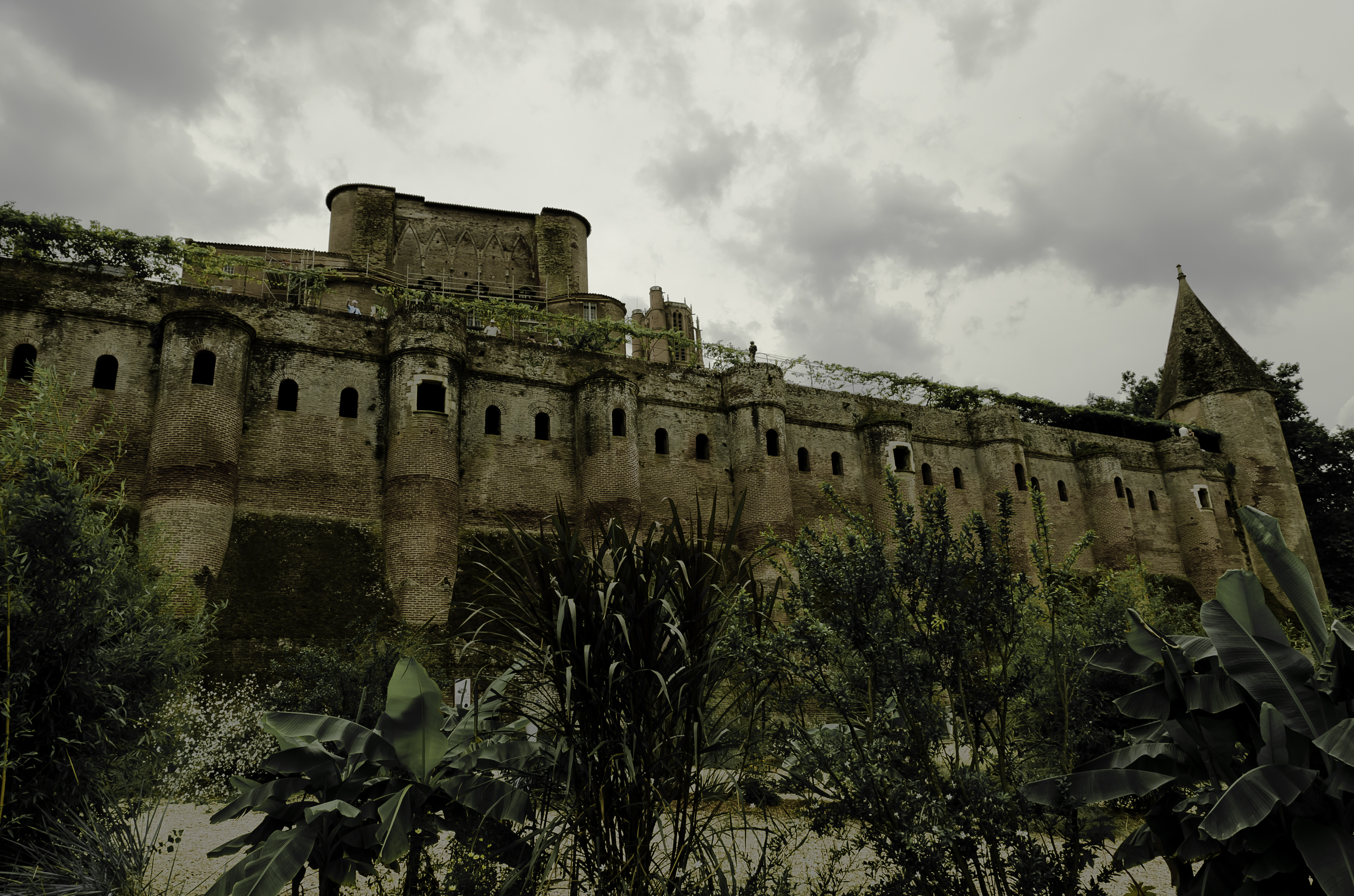 Vue des berges du Tarn .